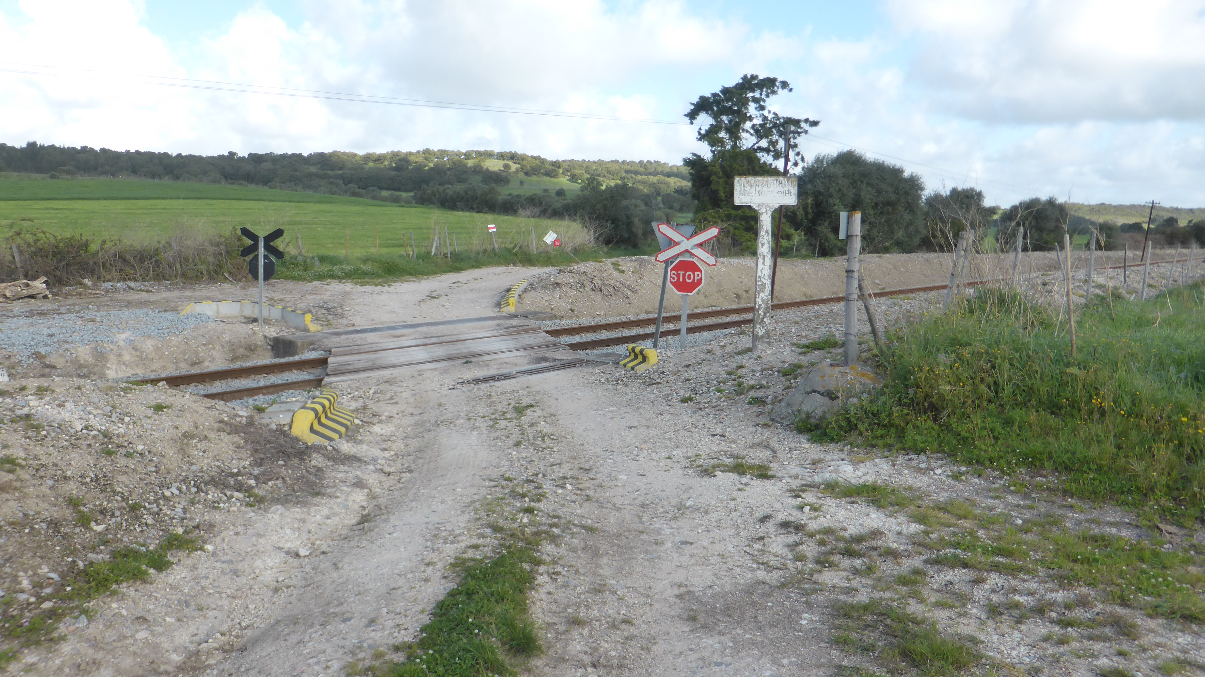 Serra de Olelas